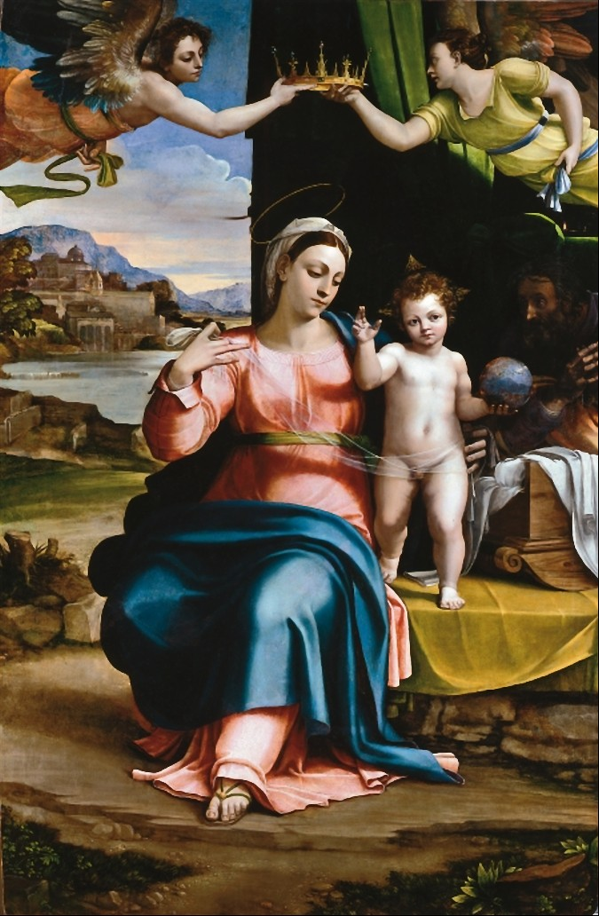 Heilige Familie. Burgos, Kathedrale.